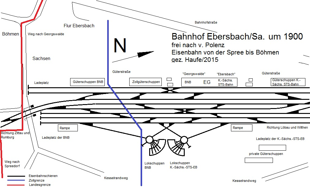 Gleisplan Bahnhof Ebersbach aus der Zeit 1873 bis 1914